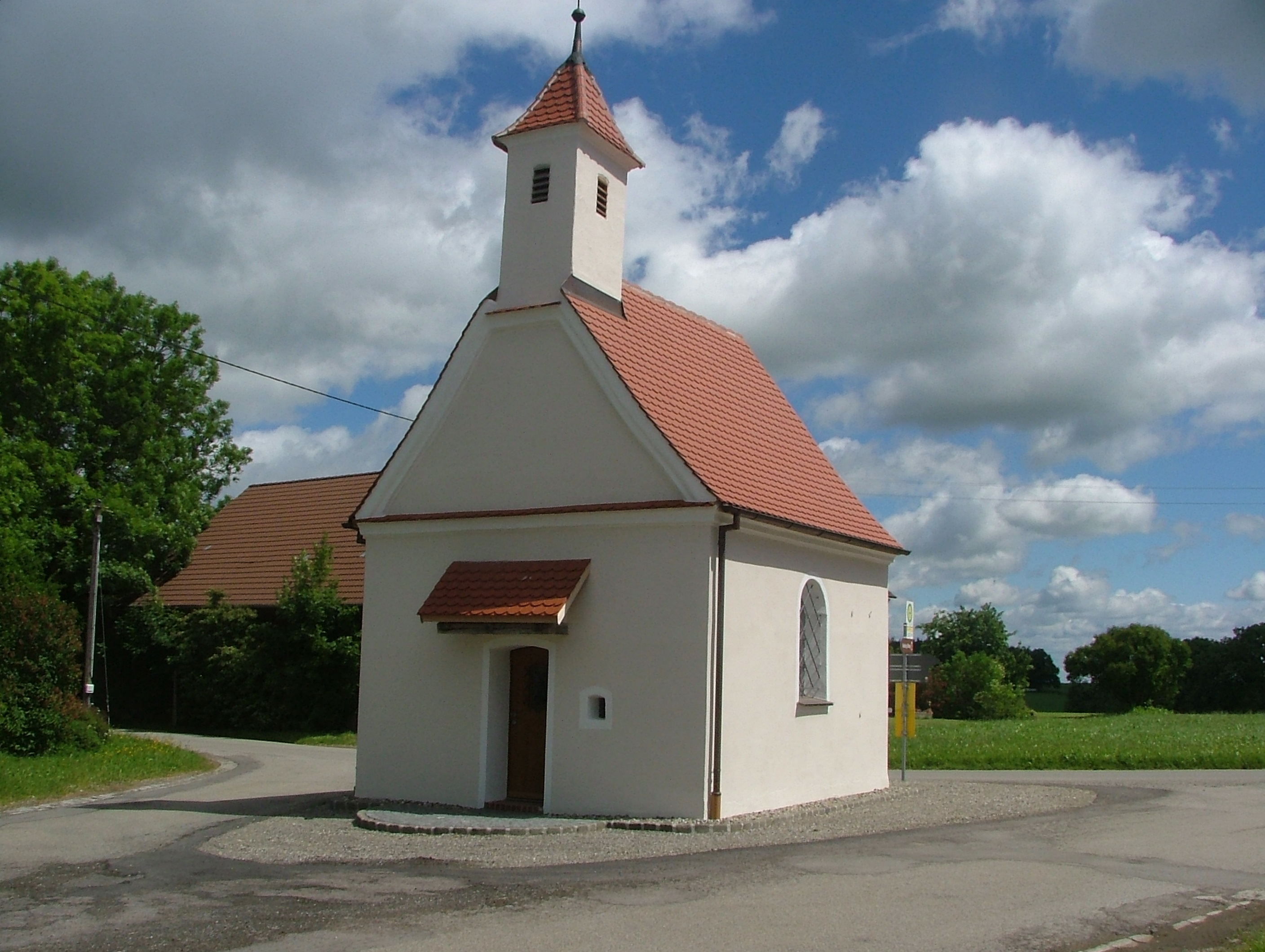 Eggisried Leonhardkapelle